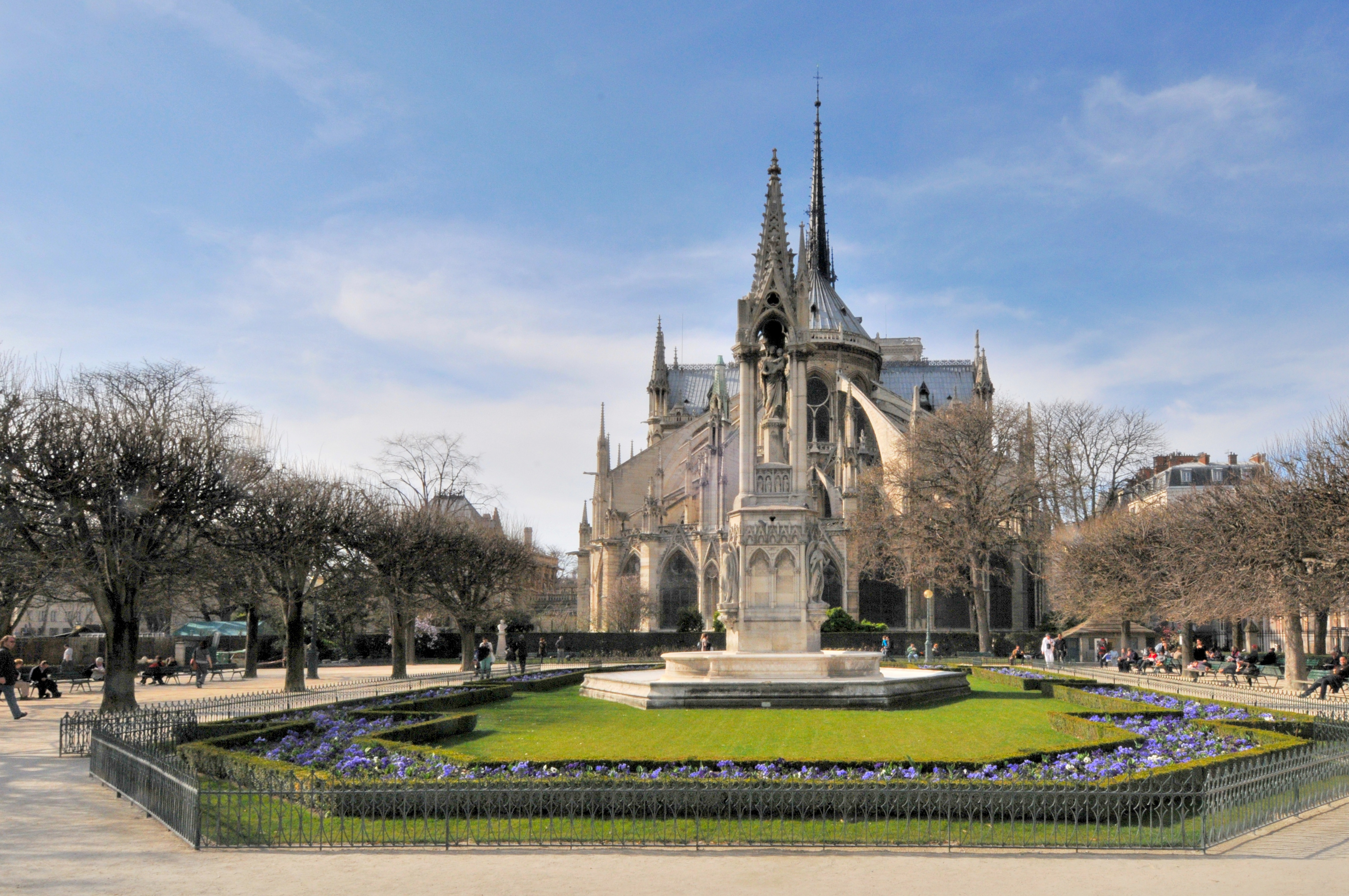 square Jean XXIII avec en arrière-plan le chevet de la cathédrale Notre-Dame de Paris.